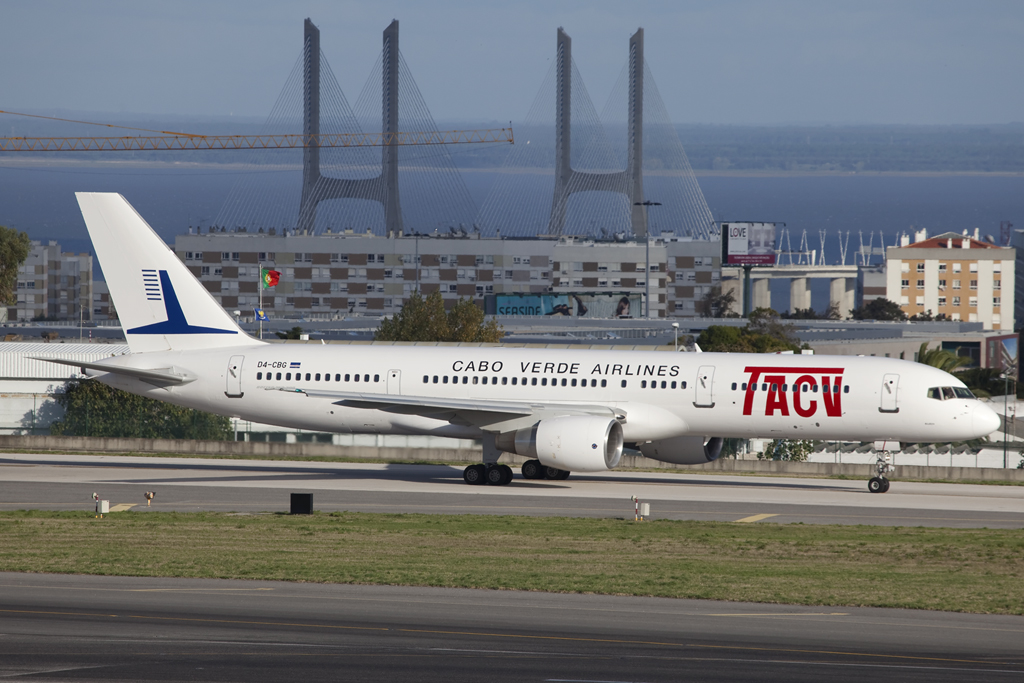 Lisboa